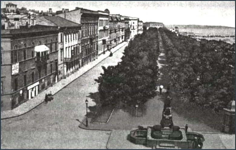 Банк и дом Эфрусси в Одессе. Открытка 80-х годов XIX века